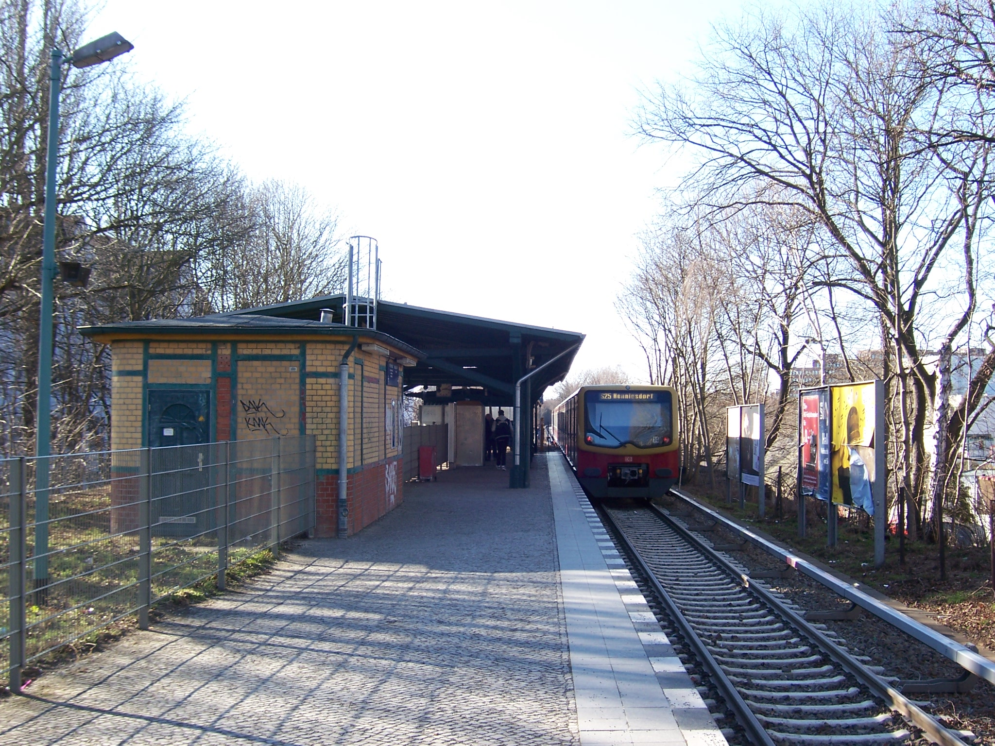 Bahnhof Berlin - Eichborndamm Bahnsteig